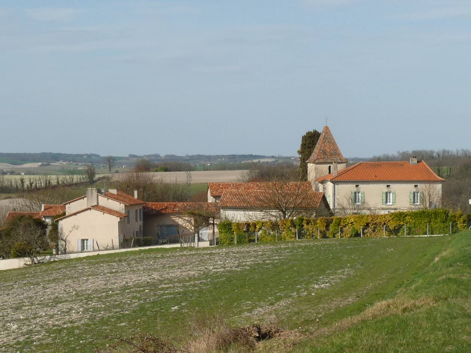 vue d'Orival, Charente, France